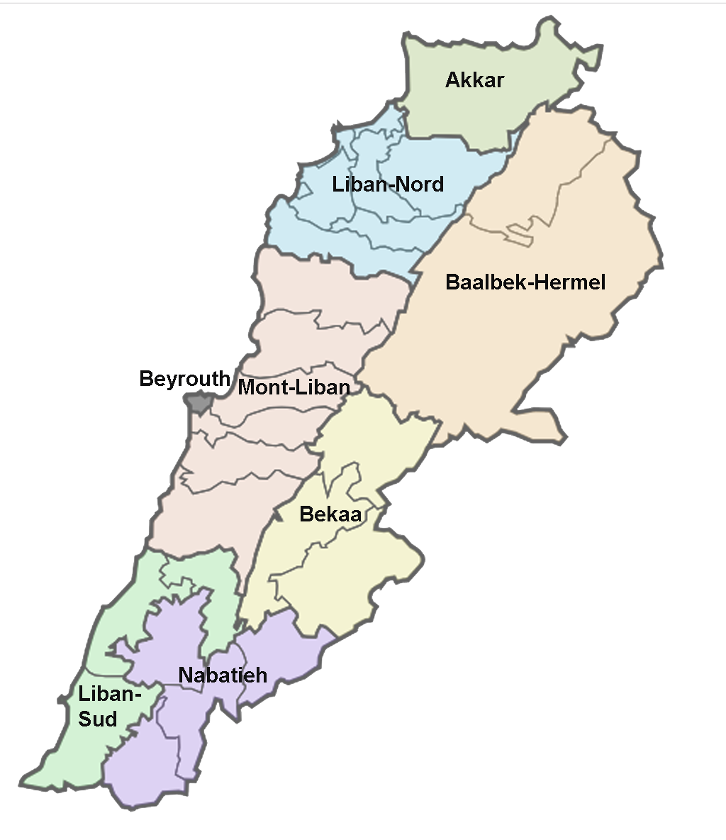 Carte des gouvernorats du Liban